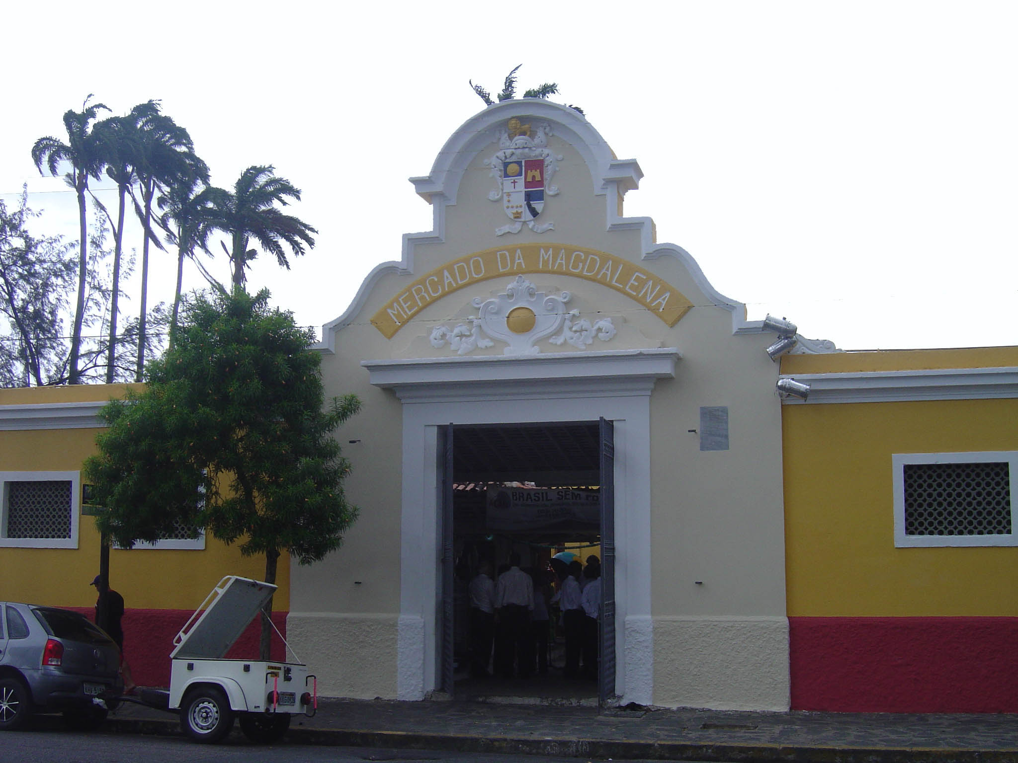 Pórtico do Mercado da Madalena, Recife, Pernambuco